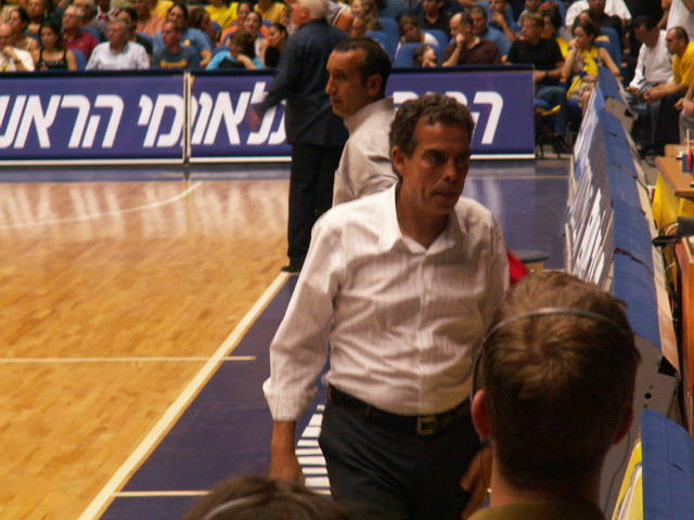 אפי בירנבויים צולם על-ידי אבי קדמי